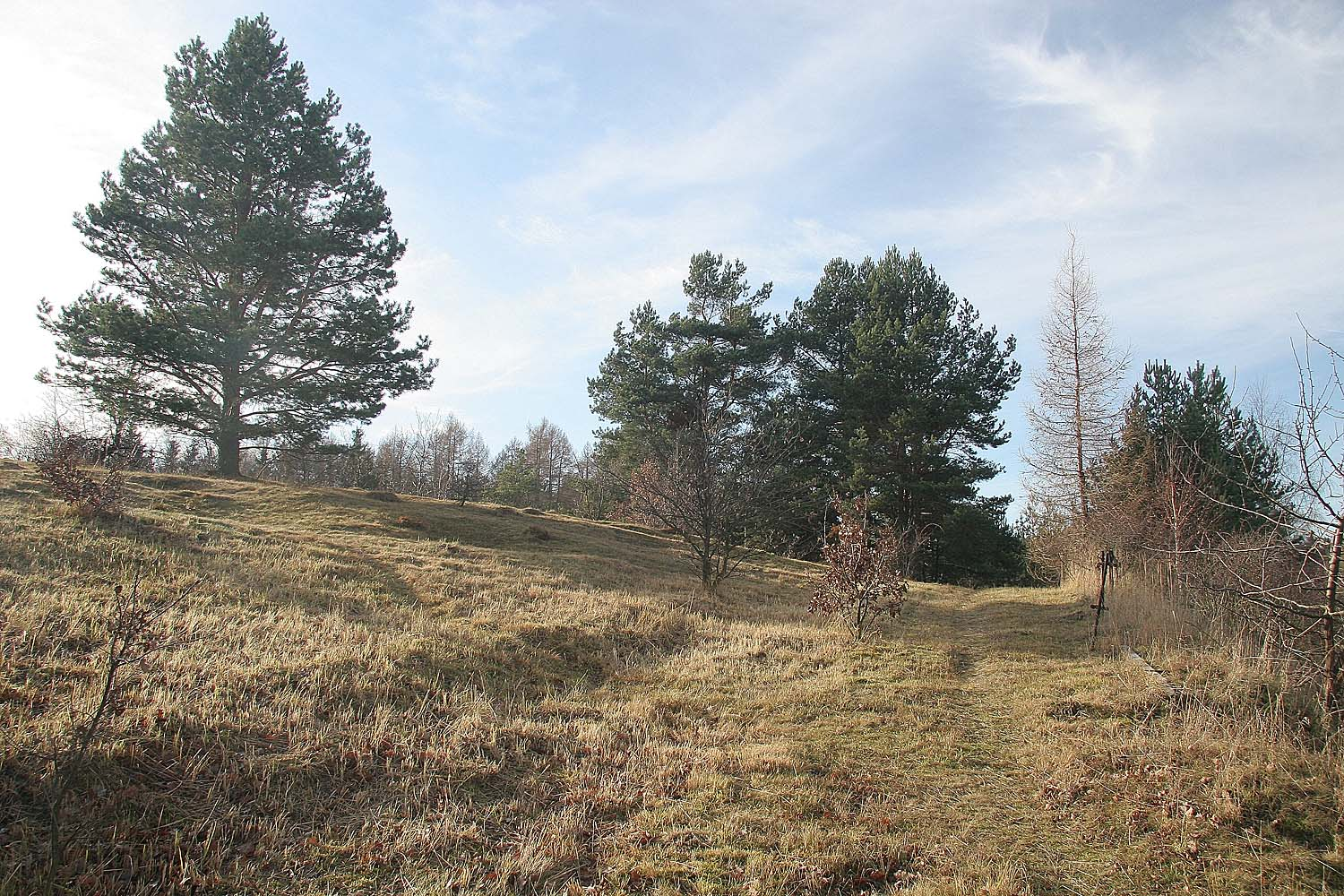 Natural monument Borecká skalka, district Havlíčkův Brod autor: Prazak date: 15. 12. 2006